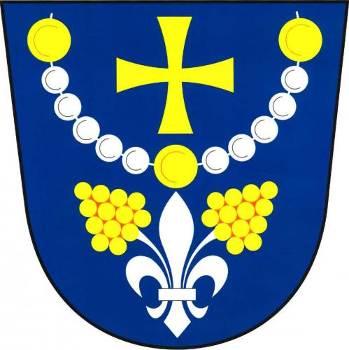 znak, Popovice, okres Uherské Hradiště